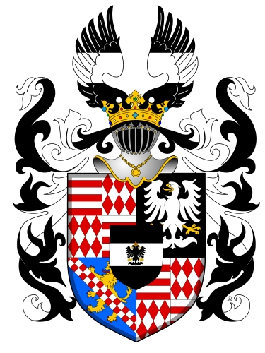 Rodový znak Colloredo-Mansfeld2